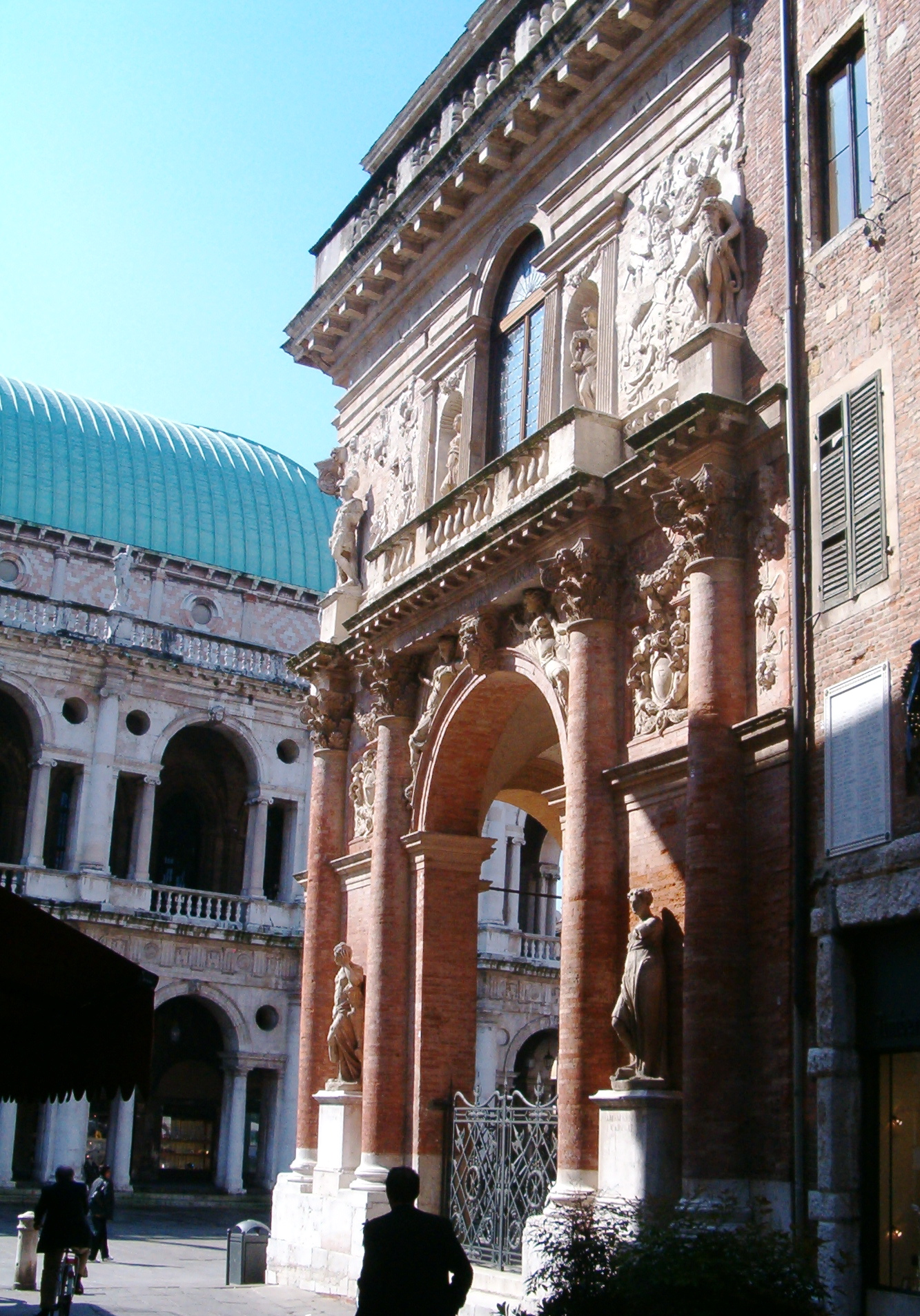 Palazzo del Capitanio (anche Loggia Bernarda), Vicenza. Arch. Andrea Palladio (1565)